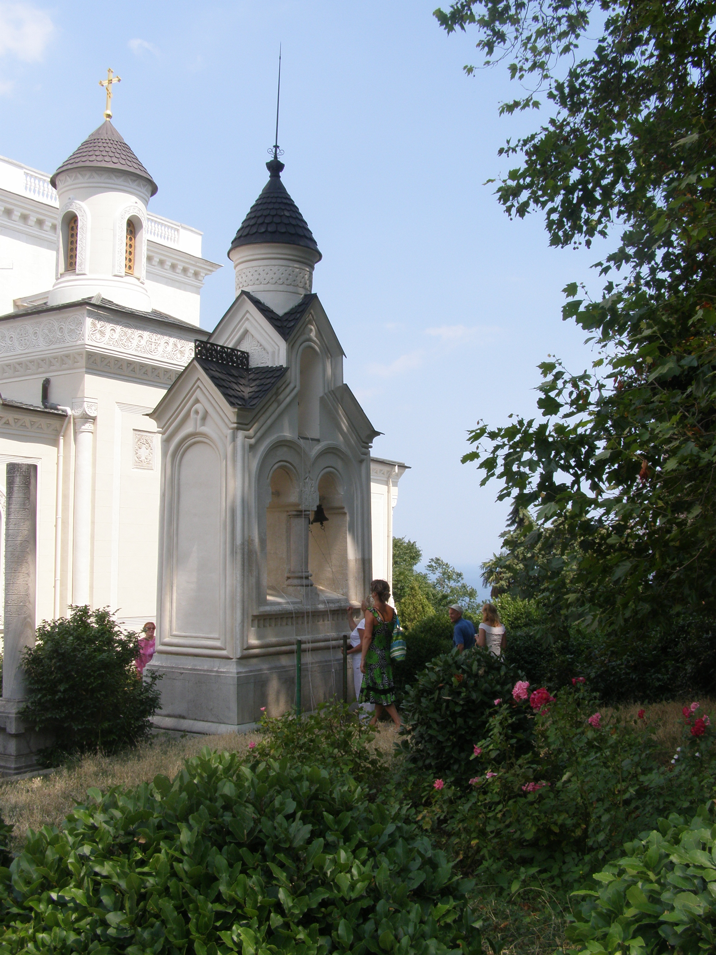 Будинок для вищих офіцерів охорони, Лівадія, вул. Севастопольське шосе, 4/2, санаторій " Прикордонник ", корпус № 3